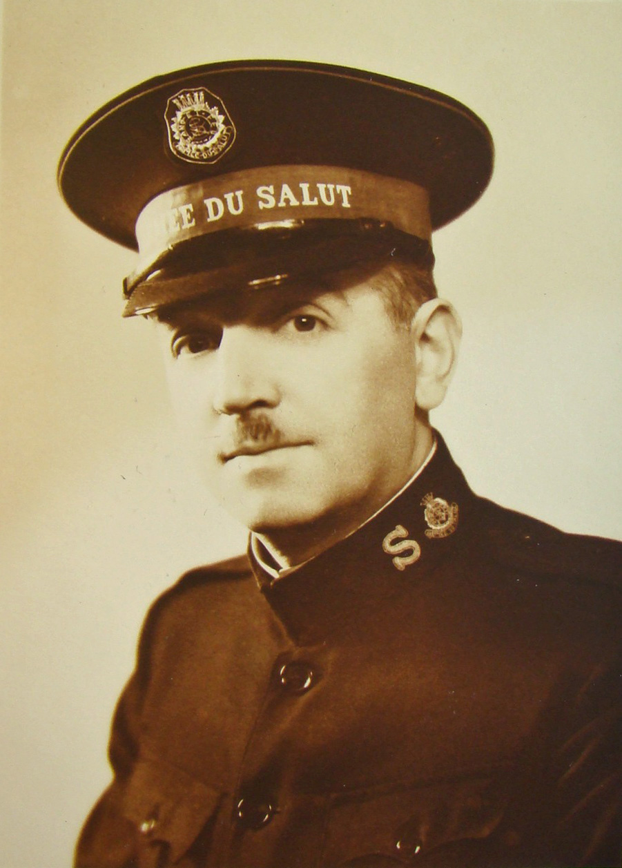 Le major Georges Flandre en 1942.